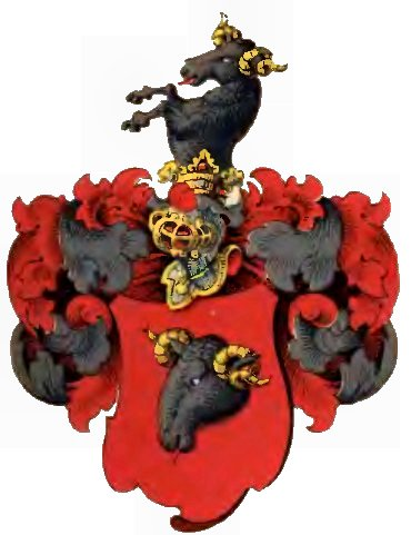 Wappen der Familie Haugwitz aus Schlesien